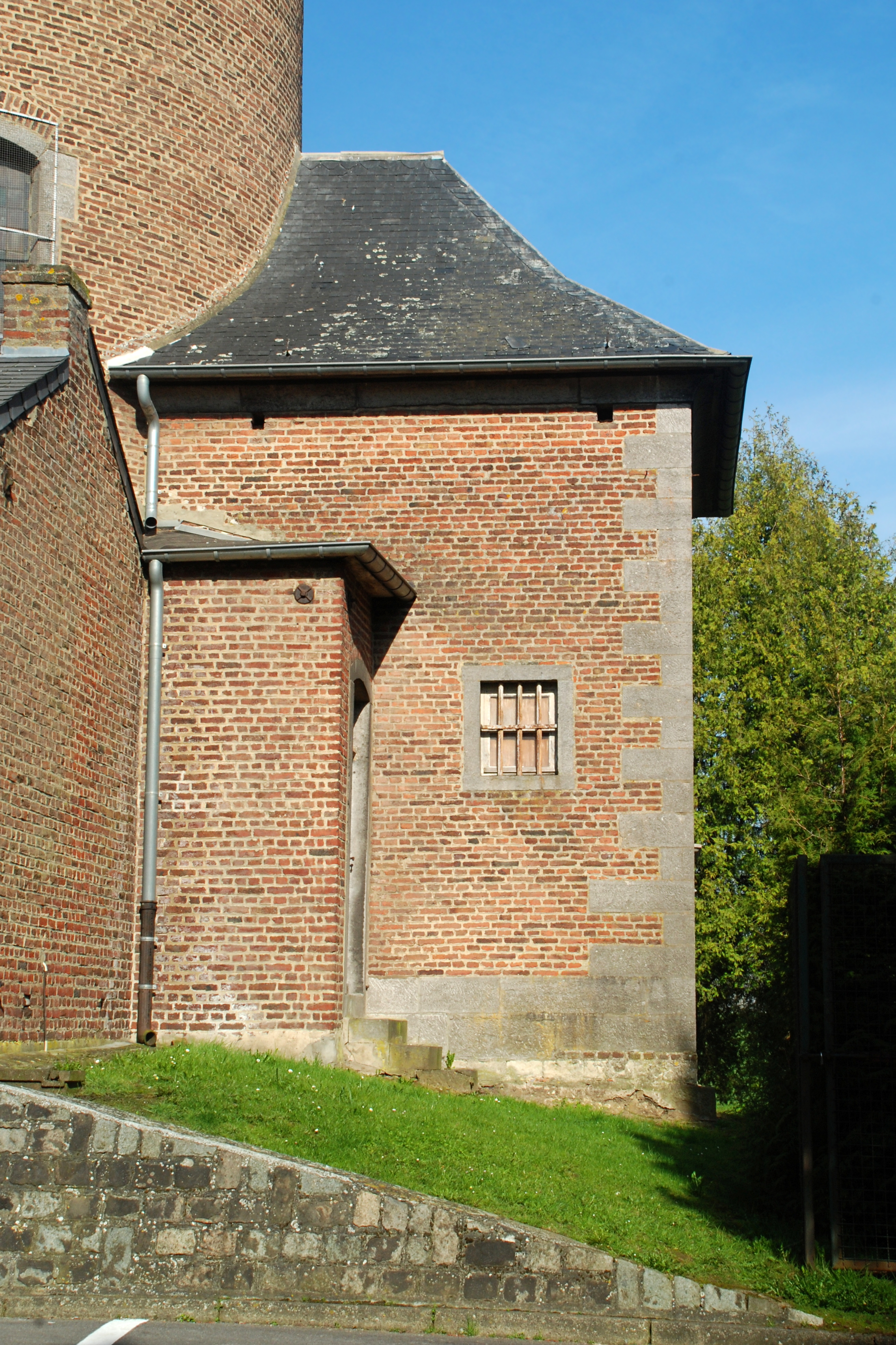 Belgique - Brabant wallon - Genappe - Baisy-Thy - Église Saint-Hubert